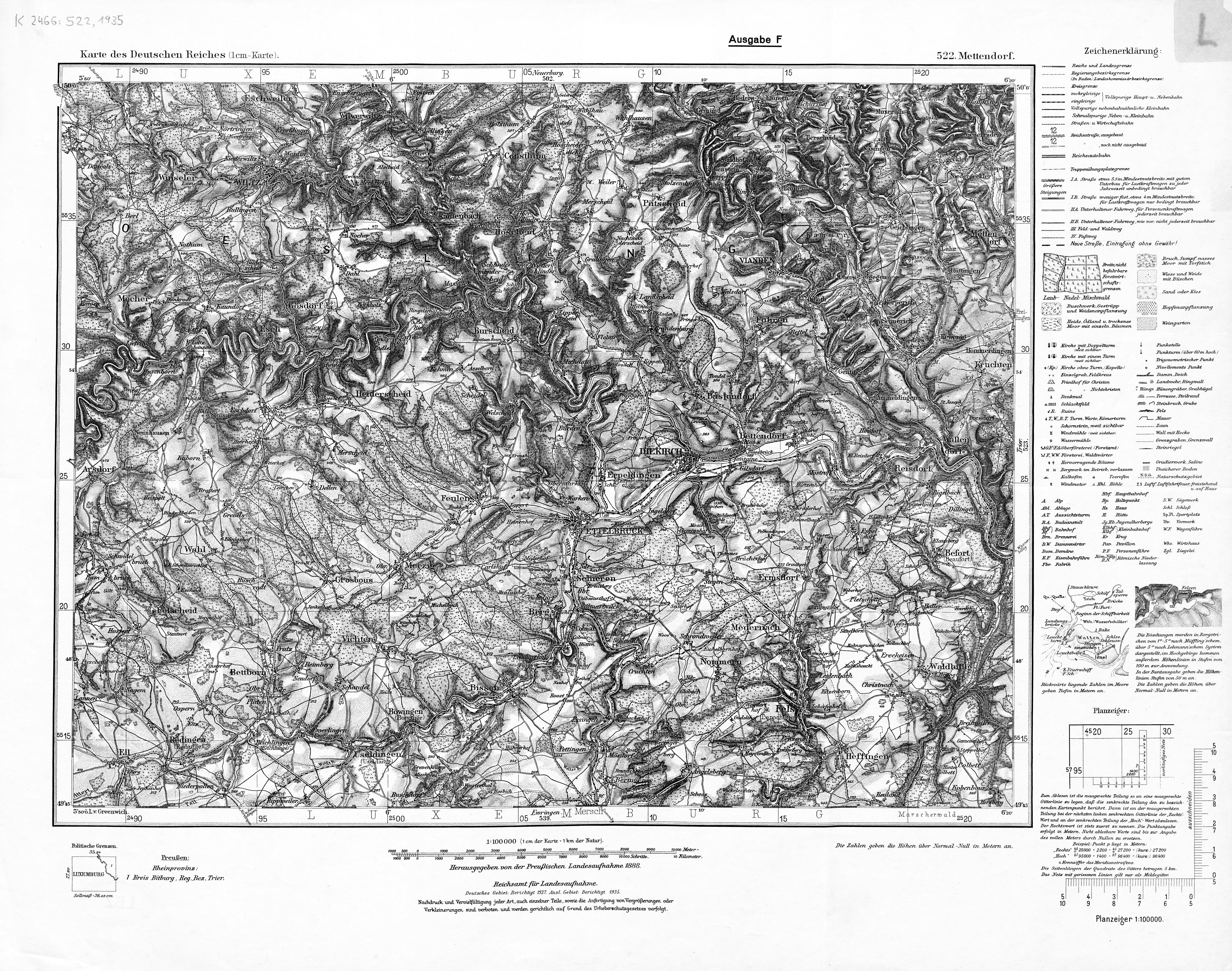 In: Karte des Deutschen Reiches/ hrsg. von der Kartogr. Abtheilung der Königl. Preuss. Landes-Aufnahme. Berlin, 1890. 1935; [Electronic ed.] Koblenz : Landesbibliothekszentrum Rheinland-Pfalz, 2010.